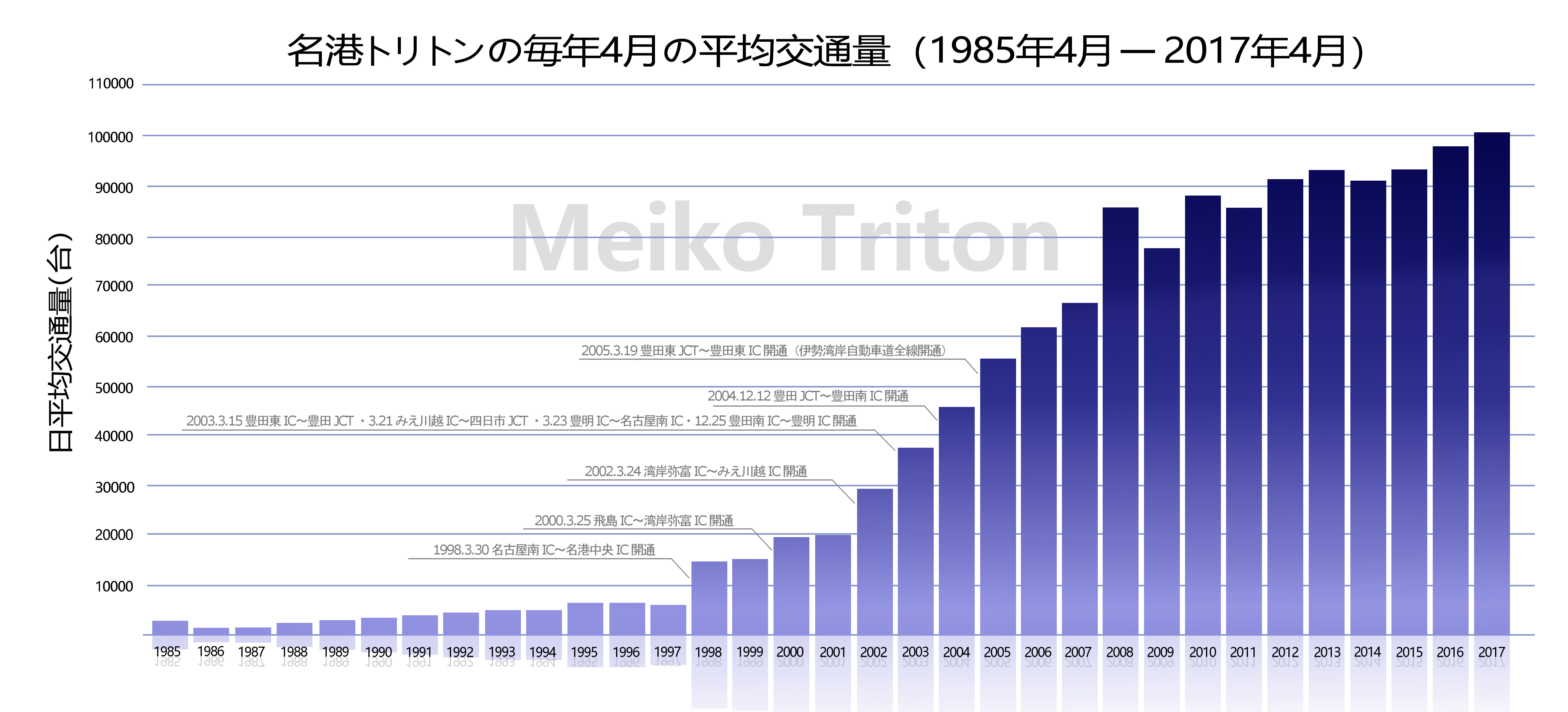 一般有料道路「伊勢湾岸道路」の1985年-2017年の各4月における通行台数の変化。典拠：『高速道路と自動車』1985年から2017年の各7月号の一般有料道路統計月報から集計。